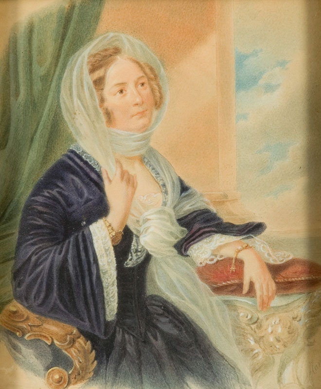 Portret Leontyny Halpertowej (1803-1895)